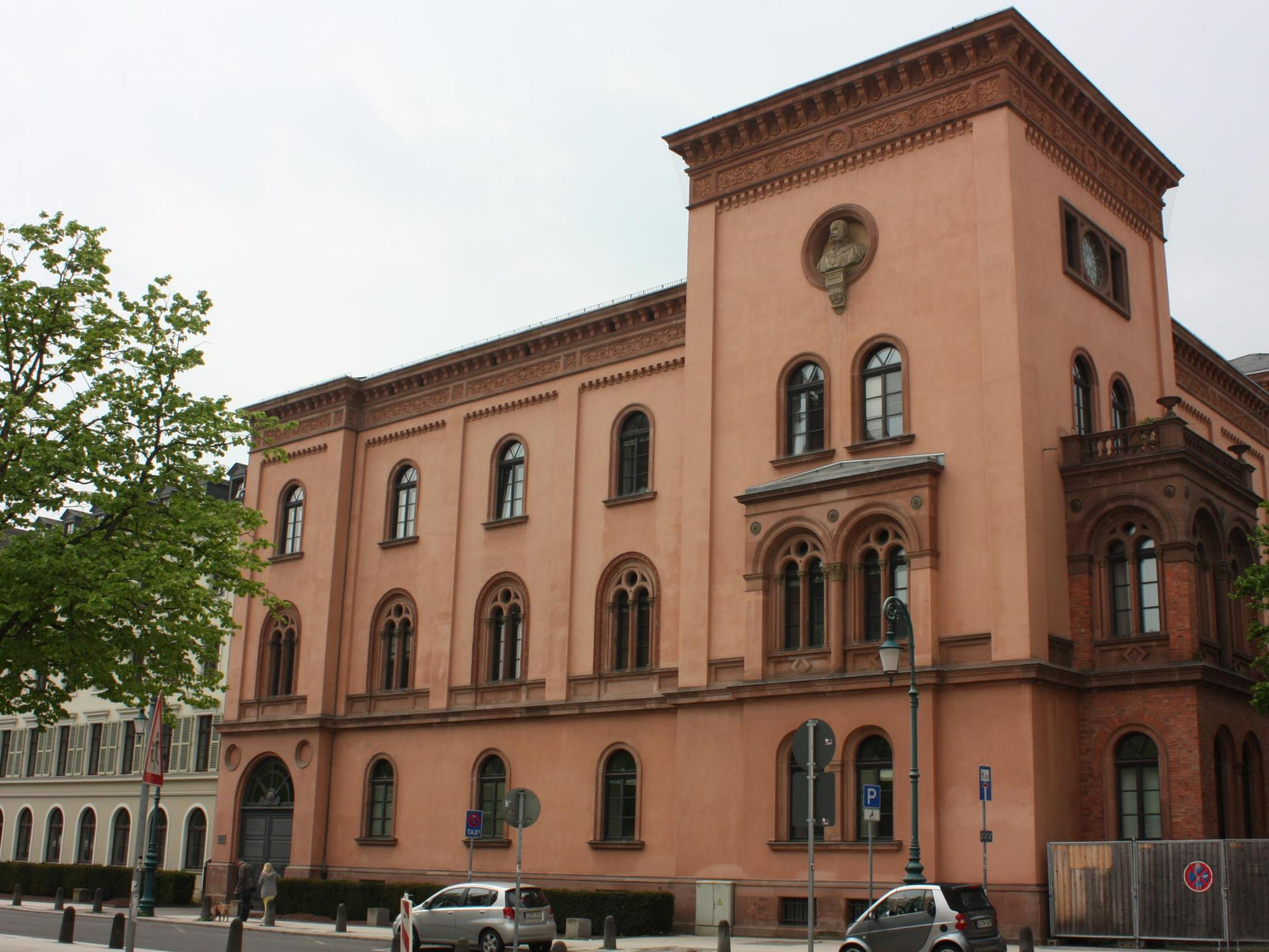 Der Wilhelmsbau des Stadtschloss Wiesbaden, Hessen, Deutschland. Er schließt sich an den rechten Flügel des Schlosses an und gehört heute zum Schlosskomplex mit Hessischem Landtag. Das Gebäude wurden während des 2. Weltkriegs stark beschädigt, nur die Fassaden konnten wieder originalgetreu hergestellt werden. Die Kaiser-Wilhelms-Heilanstalt, heute nur Wilhelmsbau genannt, wurde 1868 bis 1871 nach Plänen des Architekten Philipp Hoffmann als Militärhospital errichtet. Markant ist die überlebensgroße Büste Kaiser Wilhelms I. des Bildhauers Karl Keil in der rot verputzten Fassade.